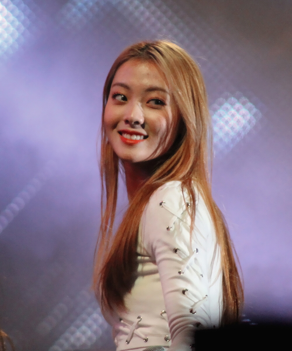 171021 Weki Meki 위키미키 대구 한드림콘서트